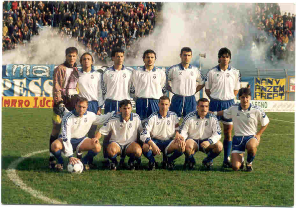 Il Matera sceso nella gara casalinga contro il Taranto nel campionato di C2 1995-96